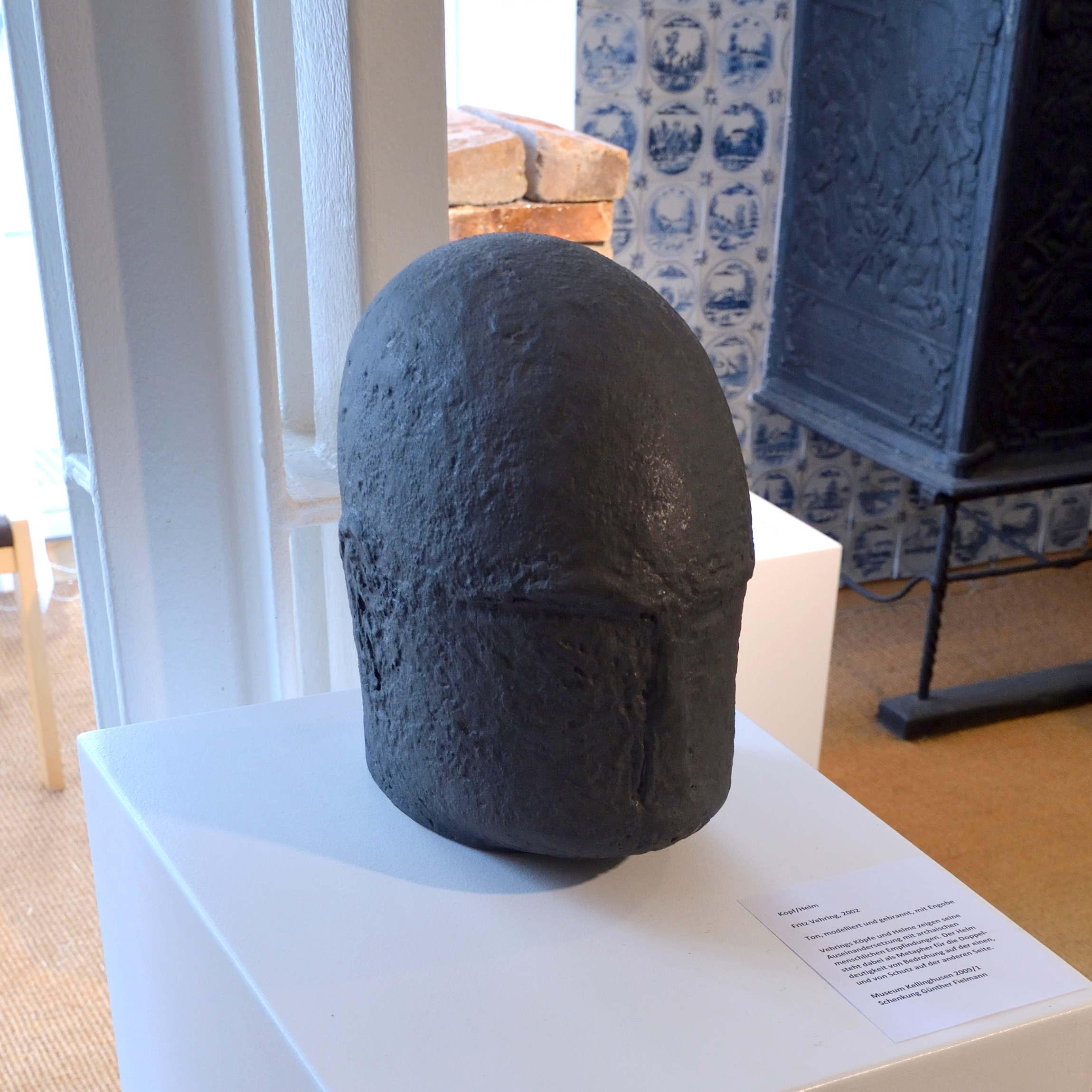 Impressionen aus dem Museum Kellinghusen. Hier: Eine Keramikskulptur von Fritz Vehring